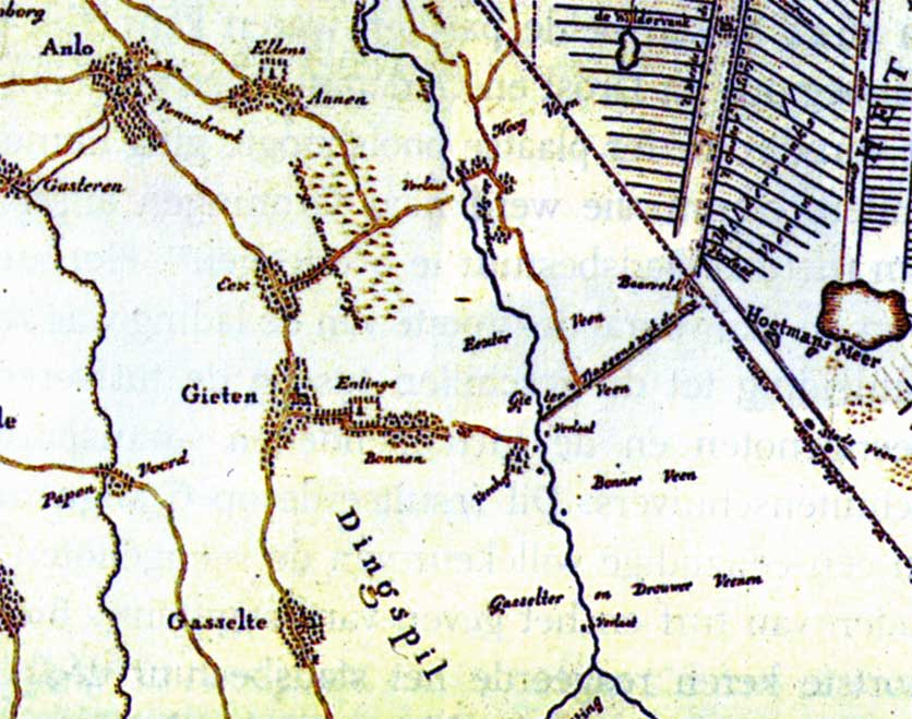 Detail van een 18e eeuwse kaart van het noordoosten van Drenthe